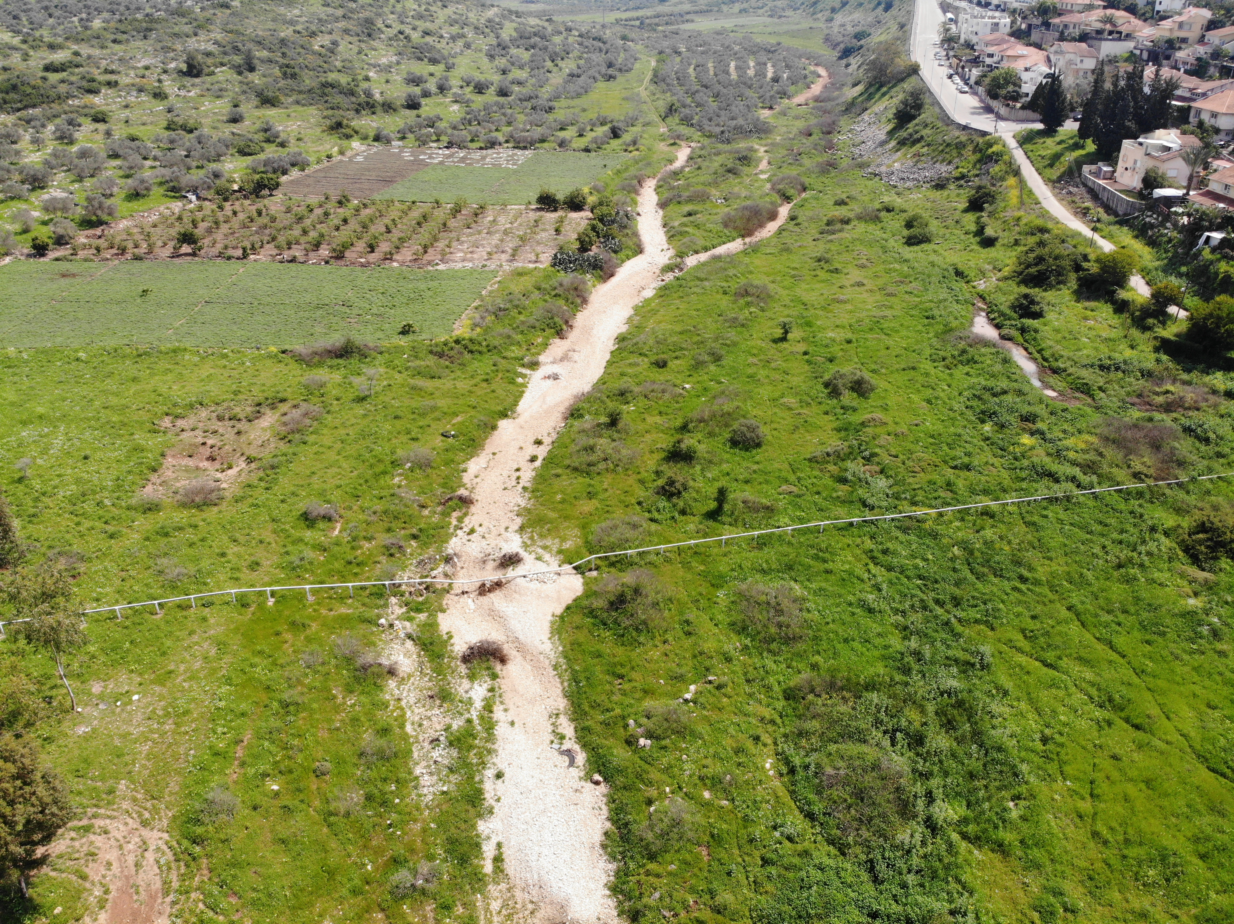 מבט לכיוון מזרח על נחל קנה, בסמוך לאורנית ובסמוך לנקודת כניסת הנחל ליער חורשים. בצד ימין למעלה - צפון מערב אורנית הגדר במרכז התמונה - ככל הנראה סימון תוואי הקו הירוק